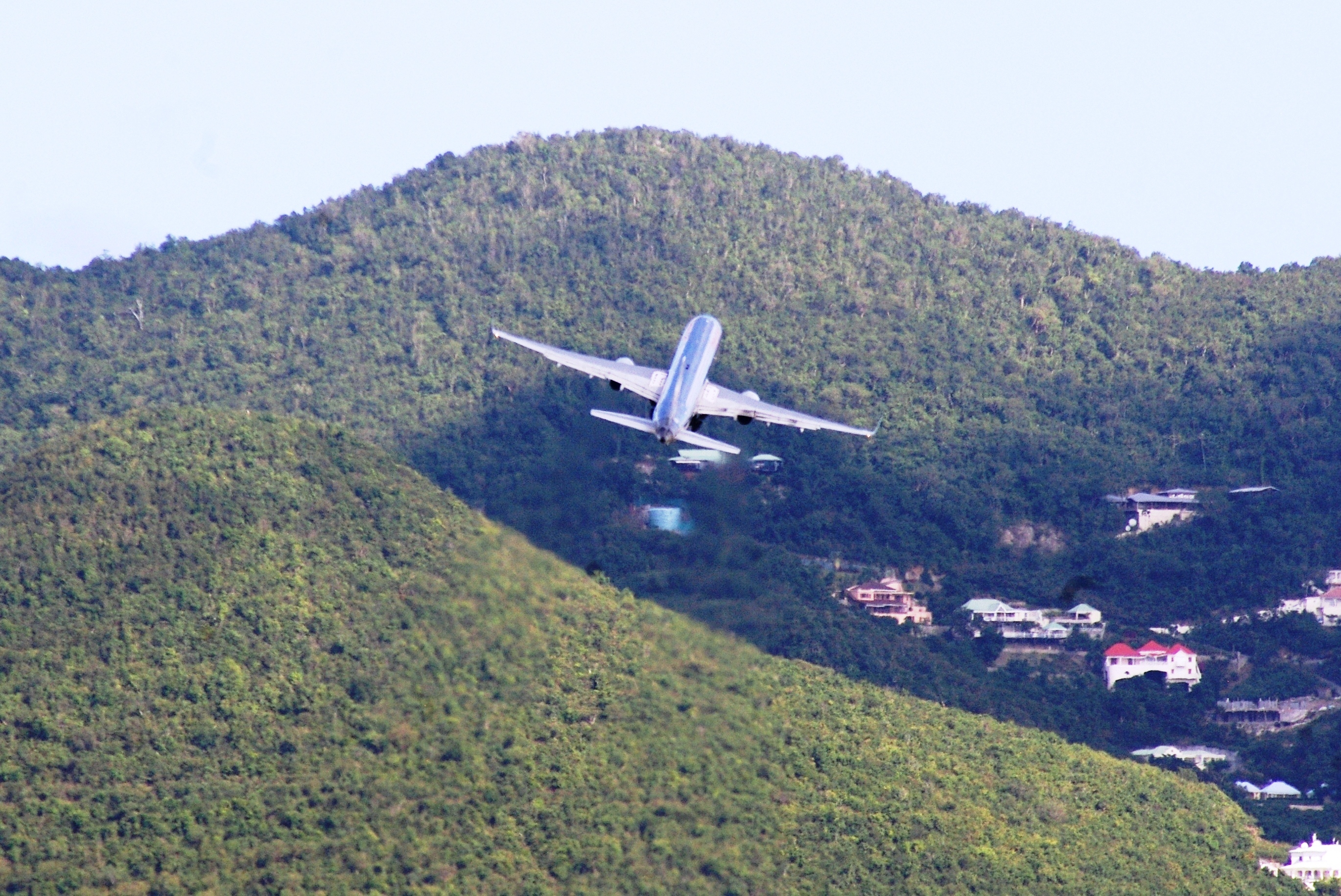 Hügel im Osten von SXM erfordert schnellen Steigflug